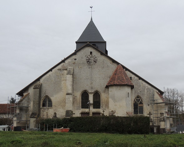 Église Saint-Parres, vue orientale, sans chevet, mais avec une tour hexagonale plus petite que le toit de l'église et de jolies arches sculptées; pelouse devant et maisons du bourg en arrière plan